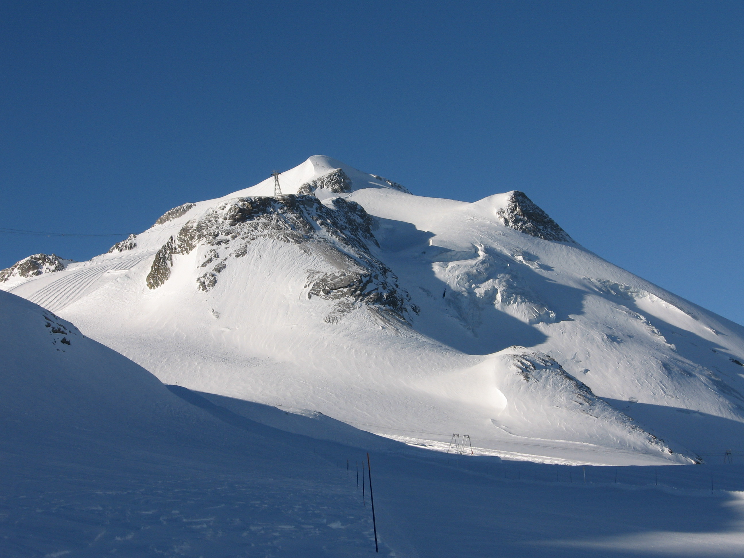 Versante est della montagna